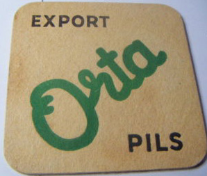 Bierviltje van de gesloten Brouwerij Tack - Kortrijk - West-Vlaanderen - België